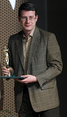 آبتین گلکار در هفتمین دوره انتخاب آثار برتر ادبیات نمایشی